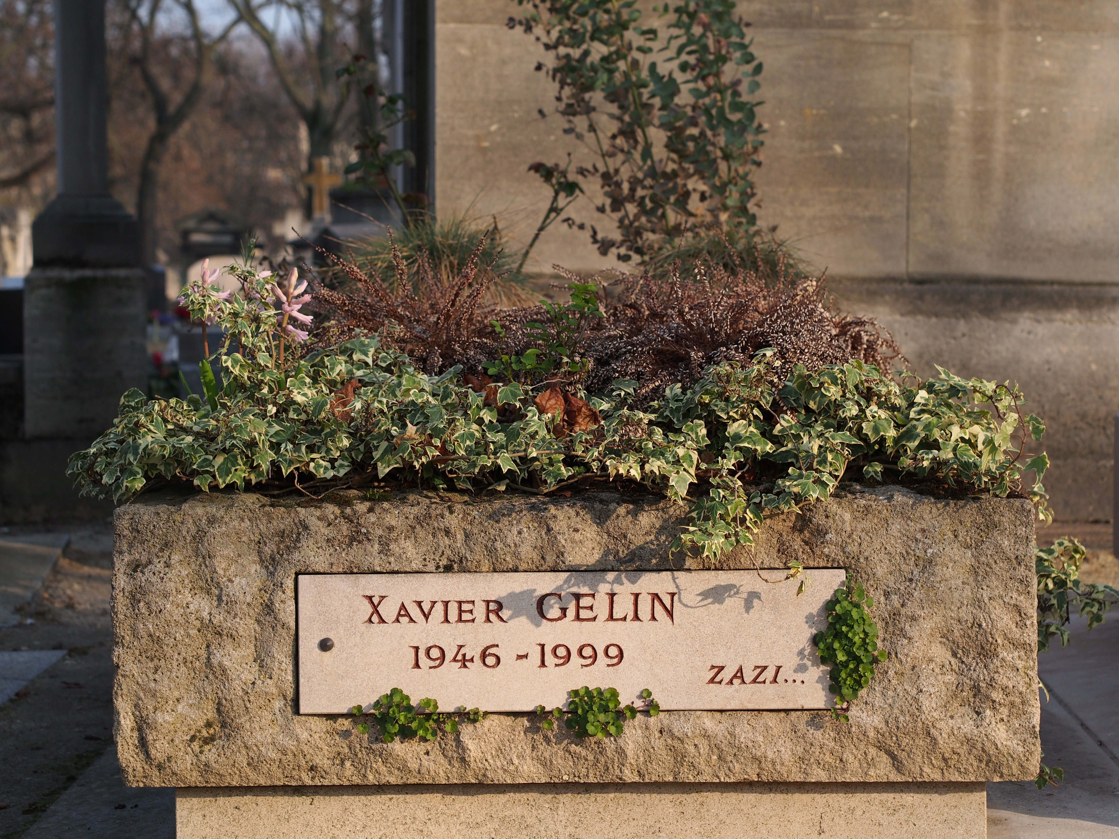 Tombe de Xavier Gélin (1946-1999) au cimetière du Montparnasse (Paris, France).